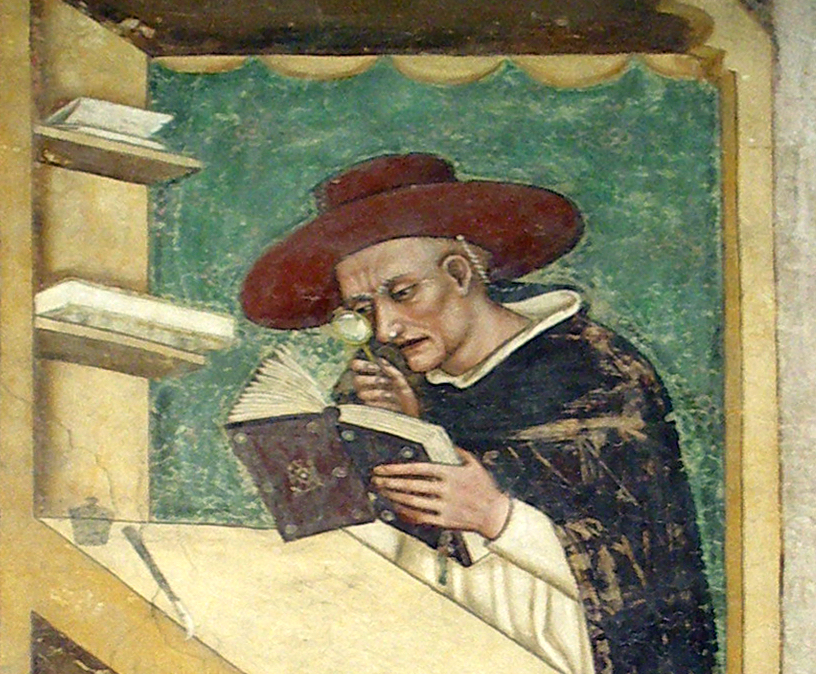 Nicolas de Fréauville, fresque (1352), église San Nicolò à Trévise (détail) : moine utilisant un verre grossissant pour la lecture